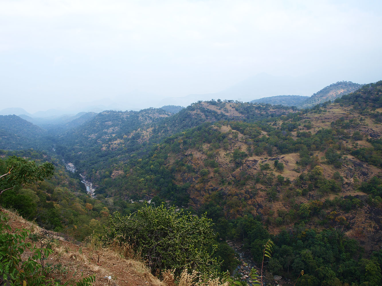 പാമ്പാർ ചിന്നാർ വന്യജീവി സംരക്ഷണ കേന്ദ്രത്തിലൂടെ ഒഴുകുന്നു. മറയൂർ-ചിന്നാർ റോഡിൽനിന്നുള്ള കാഴ്ച.